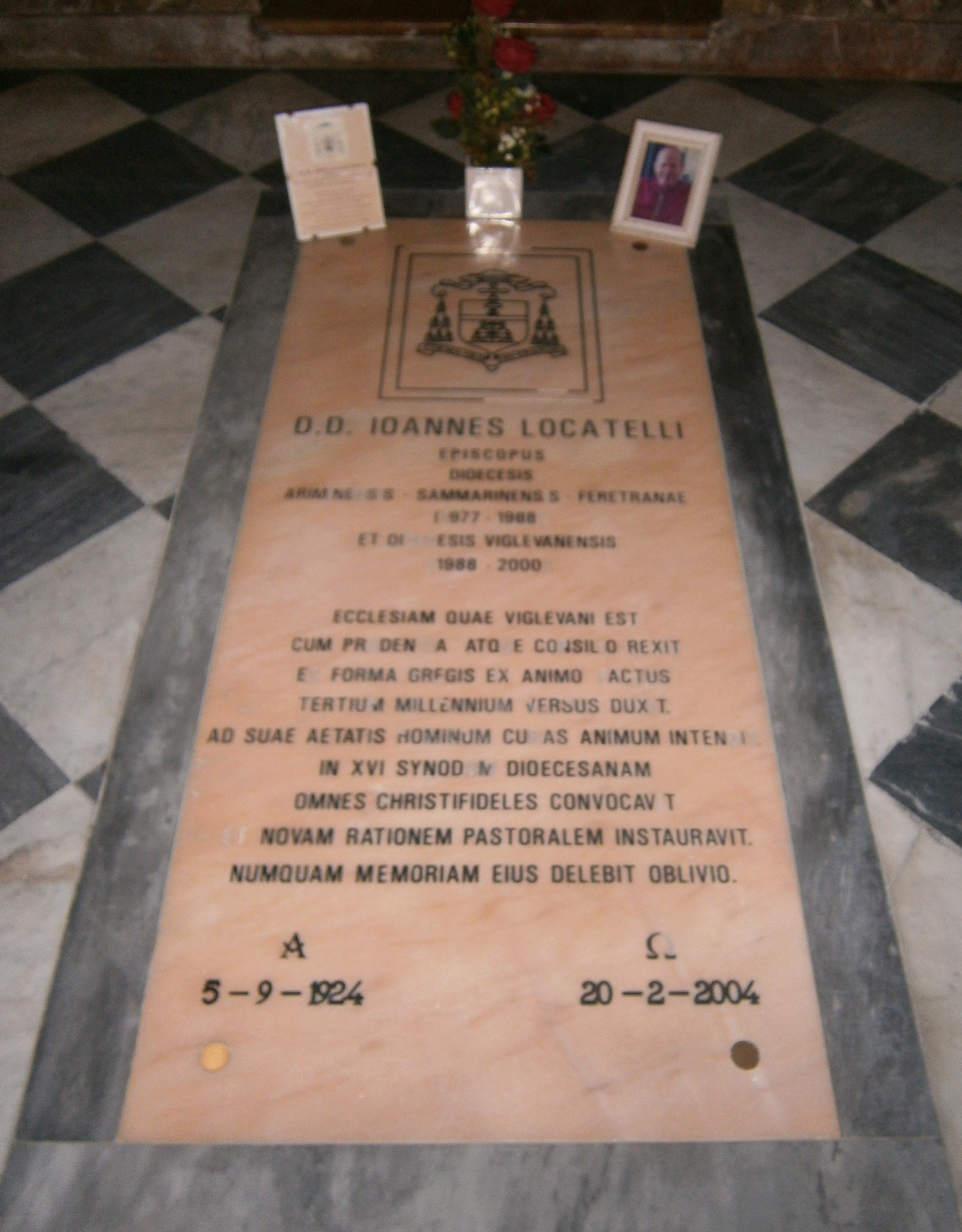 Pietra tombale di S. E. Mons. Giovanni Locatelli, già vescovo di Vigevano, dopo essere stato vesocvo a Rimini